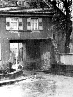 Rinderbachtorhaus: Foto: Historischer Verein Ingelheim e.V. Mit Bestätigung des Historischen Vereins Ingelheims. Danke nochmal an dieser stelle.